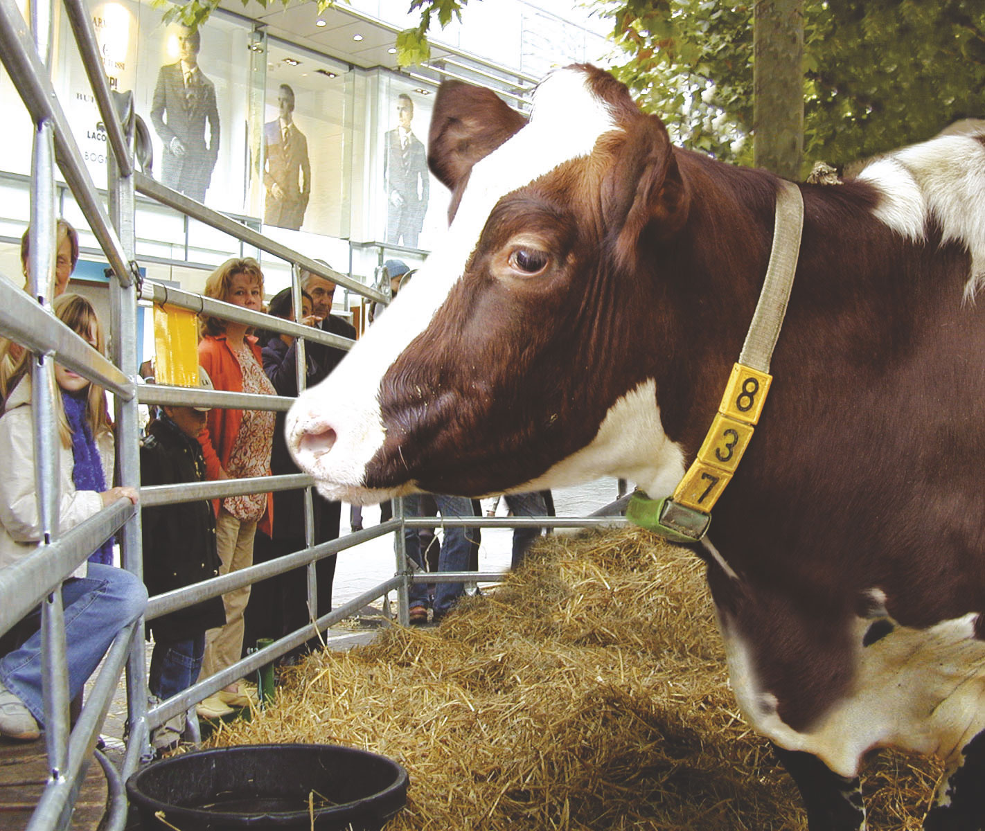 Das Erntefest in der Frankfurter Innenstadt schafft eine "ländliche Atmosphäre",die den Dialog zwischen Großstadt und ländlichem Raum fördert.